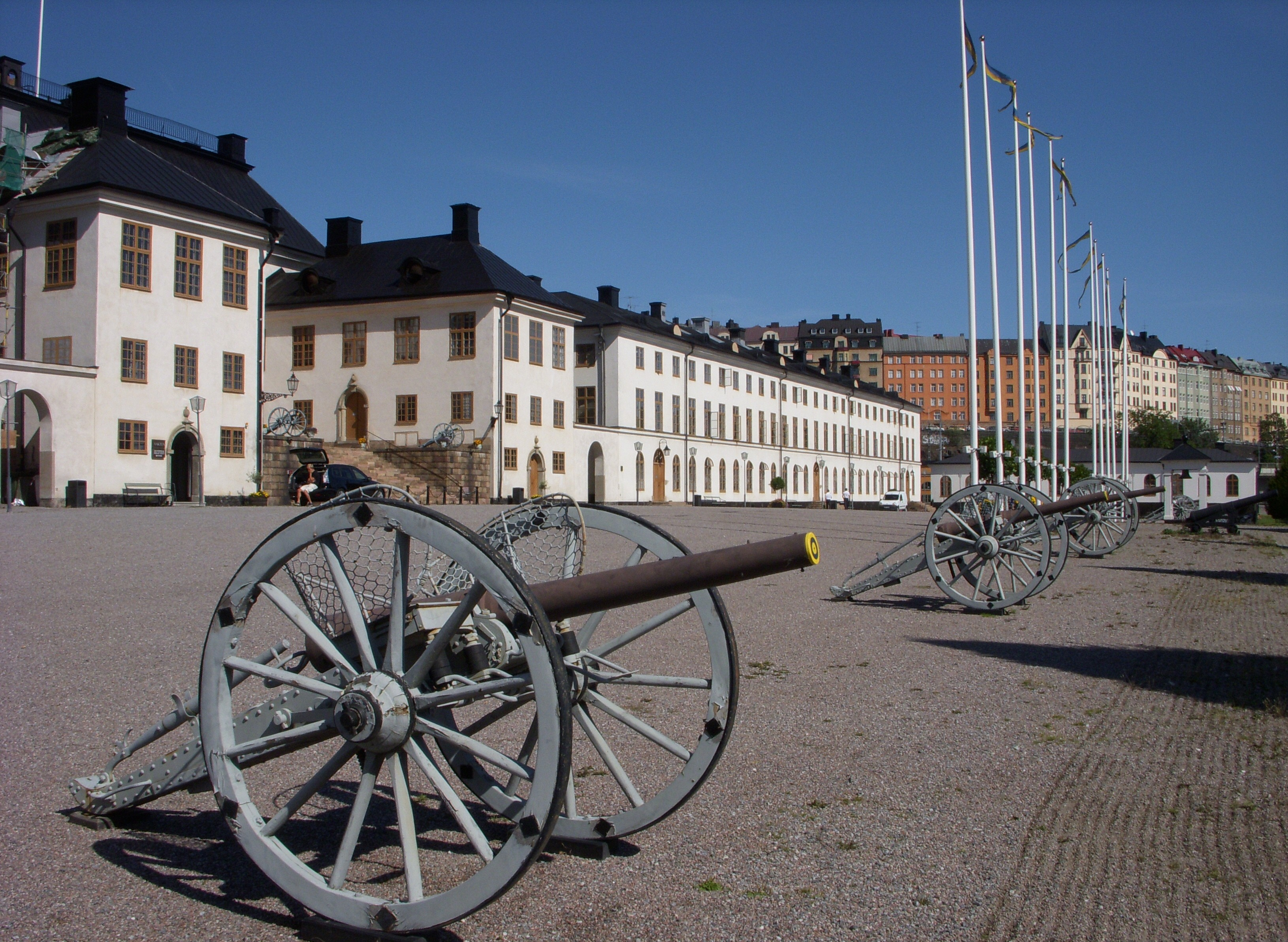 Karlbergs slott, Solna, exercisplatsen, sydsidan